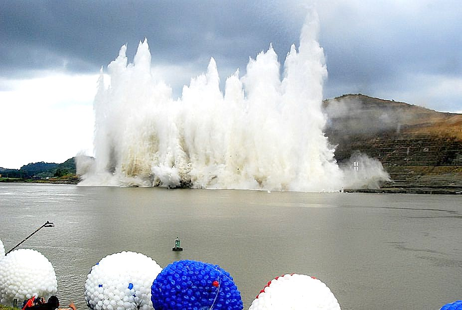 Ceremonia de inicio de los trabajos de la ampliación del canal de Panamá, el día 3 de sept. de 2007